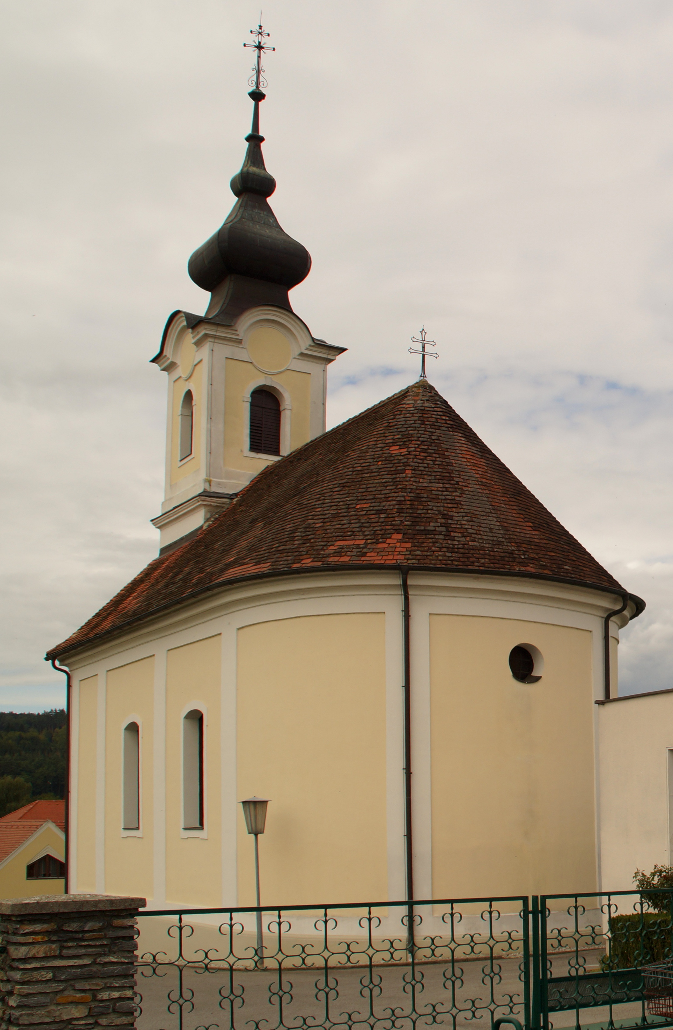 Kath. Filialkirche hl. Urban mit Aufbahrungshalle, Riedlingsdorf